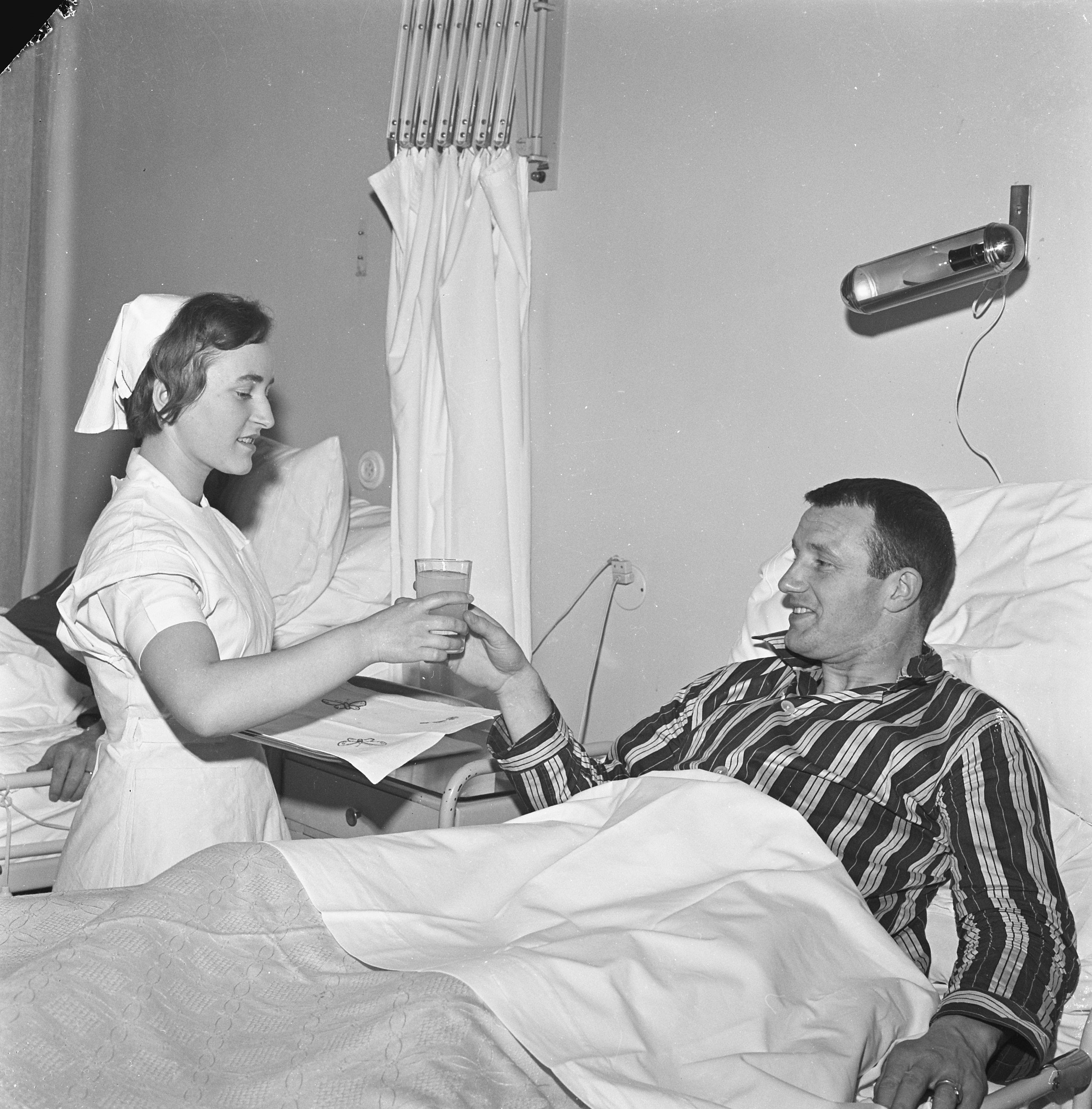 Collectie / Archief : Fotocollectie Anefo Reportage / Serie : [ onbekend ] Beschrijving : Ad Verhoeven (Sparta) geopereerd aan blinde darm Datum : 9 maart 1962 Trefwoorden : verpleegsters, zieken Persoonsnaam : Verhoeven, Ad Instellingsnaam : Sparta Fotograaf : Koch, Eric / Anefo Auteursrechthebbende : Nationaal Archief Materiaalsoort : Negatief (zwart/wit) Nummer archiefinventaris : bekijk toegang 2.24.01.03 Bestanddeelnummer : 913-6197